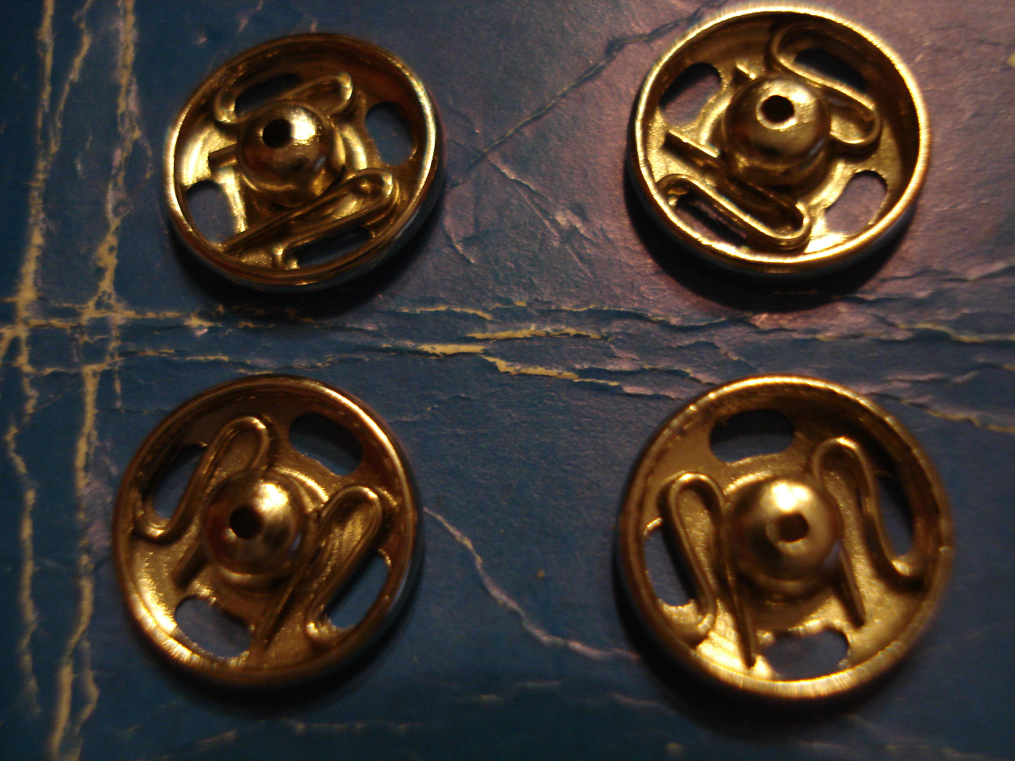 Prembutonoj